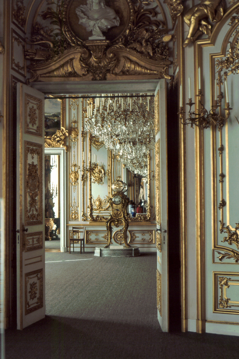 Neues Schloss Herrenchiemsee, Blick in das Arbeitszimmer